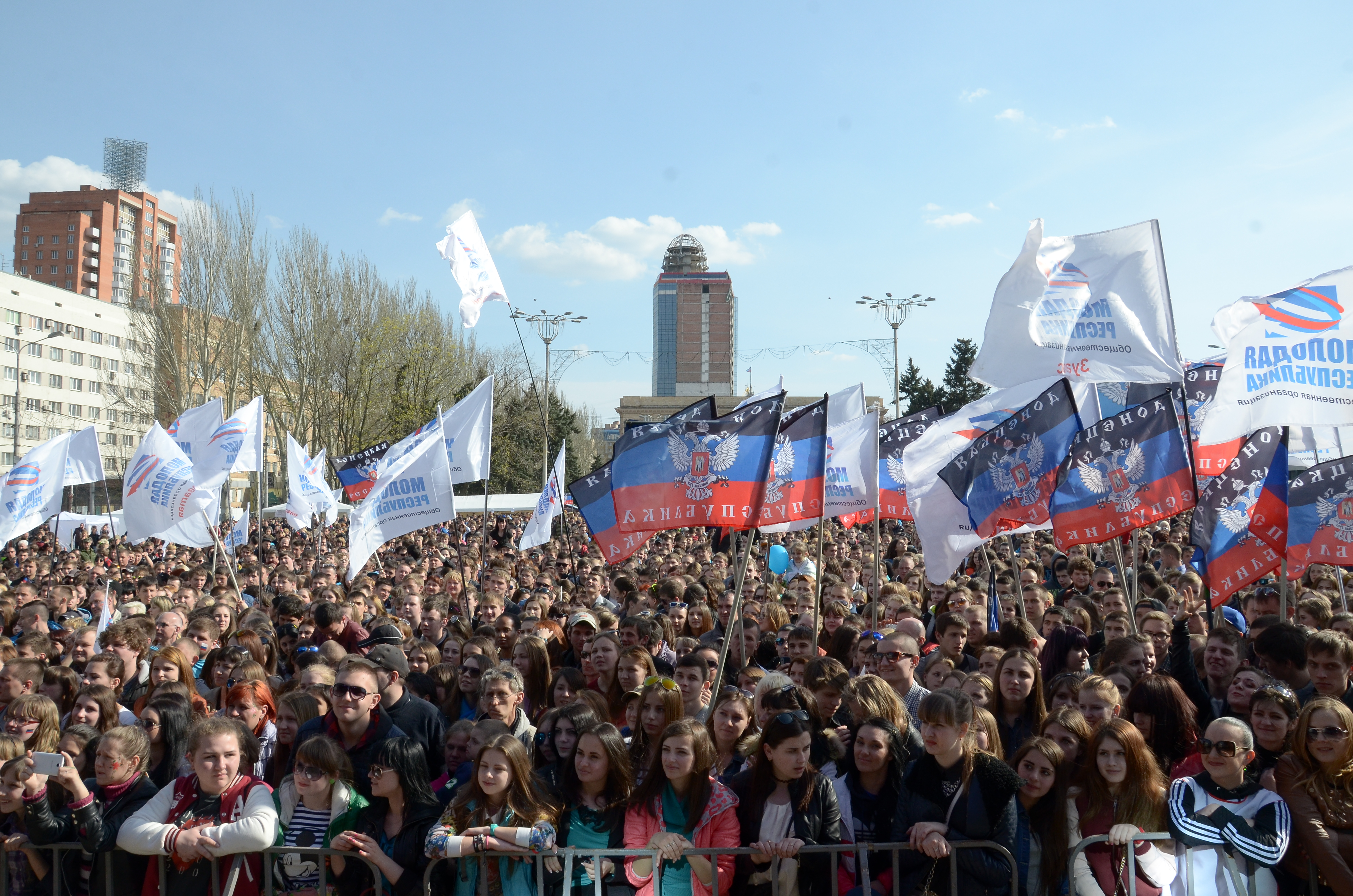 День солидарности молодёжи в Донецке